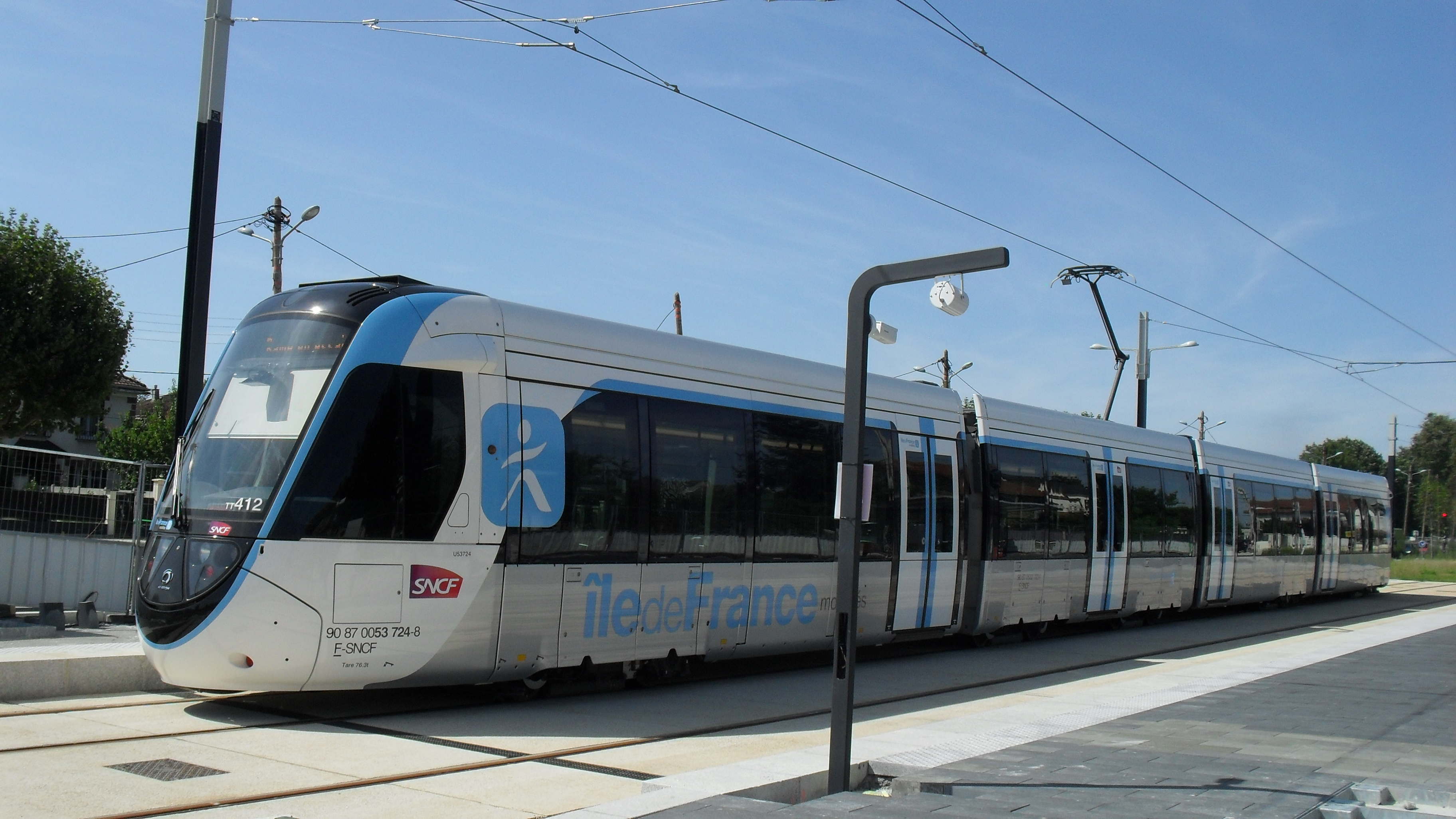 Tram-train U53700 en essais à la future station Arboretum